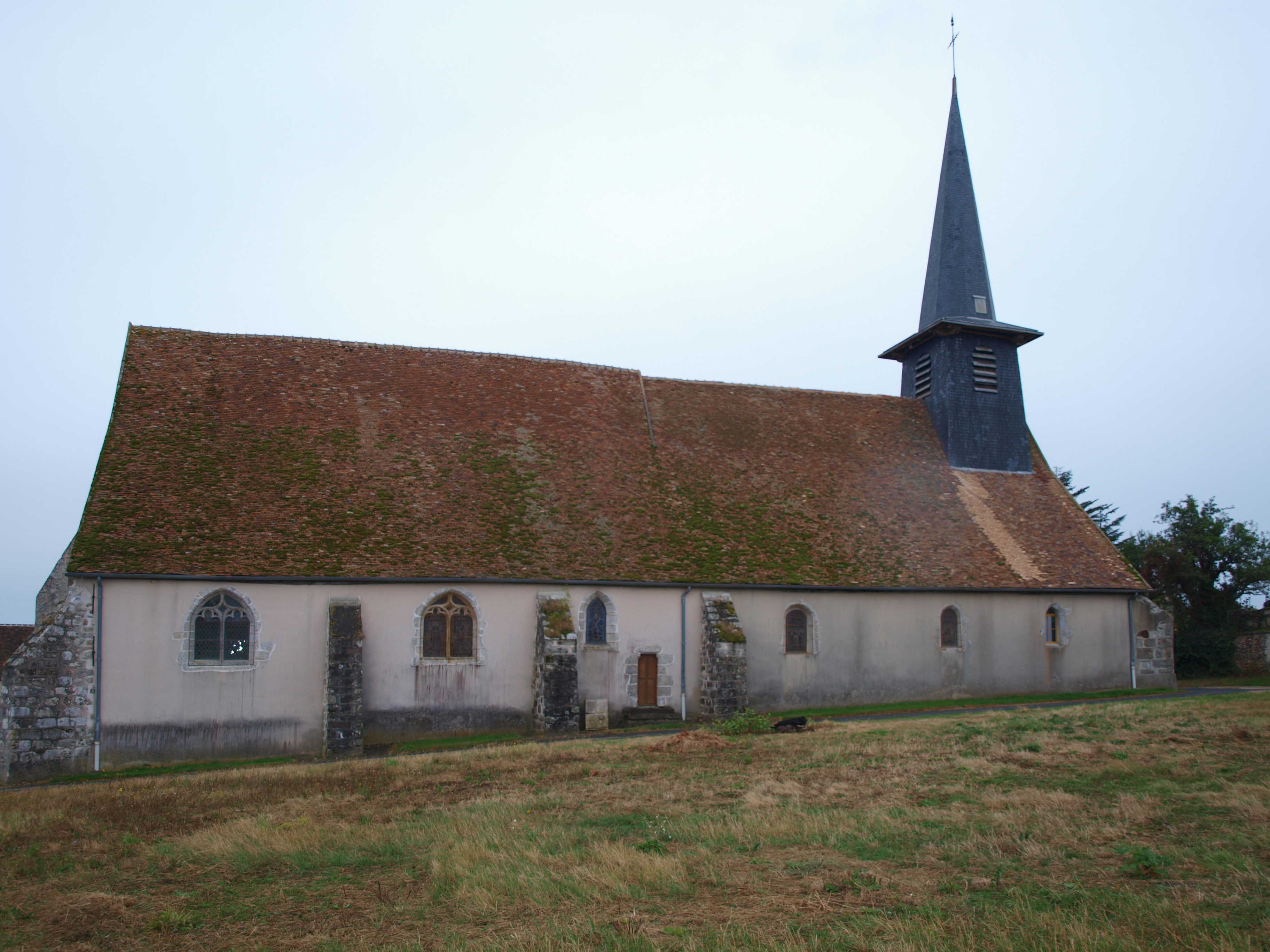 Dollot (Yonne ; France) ; l'église.